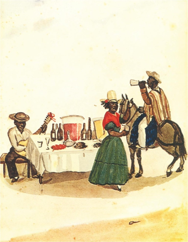 Puesto de chicha y picante, en Manuel Cisneros Sánchez, Pancho Fierro y la Lima del 800. Lima, 1975. Lám. 29 - Pág. 93.